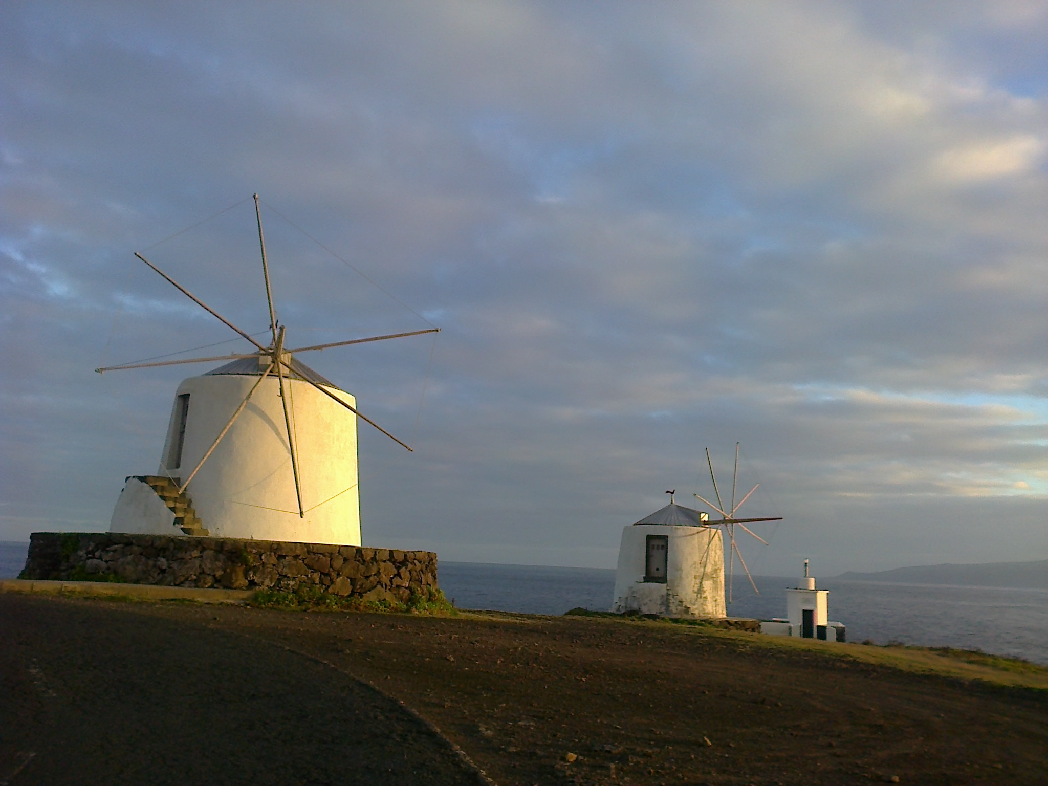 Moinhos de vento, Vila do Corvo, ilha do Corvo, Região Autónoma dos Açores, Portugal.